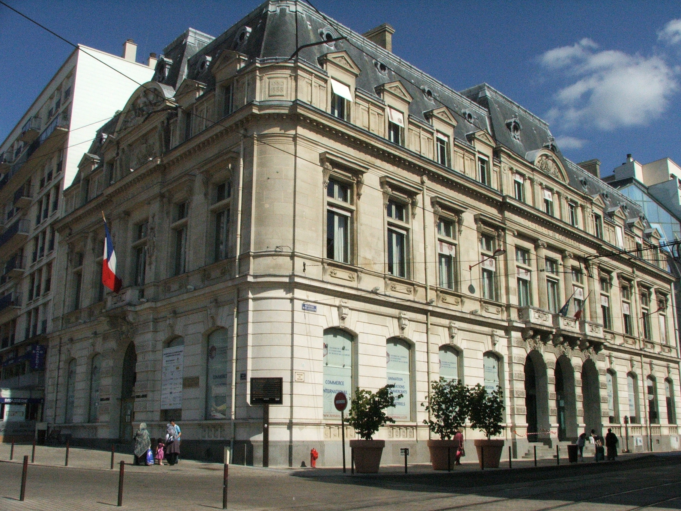 La Bourse du Mans, construite dès 1866 sur la place de la République au coeur du centre-ville.